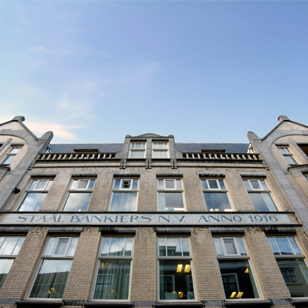 Hoofdkantoor Staalbankiers in Den Haag